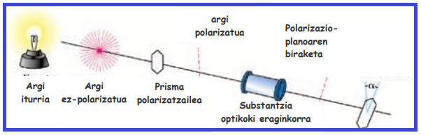 Polarizazio prozesua